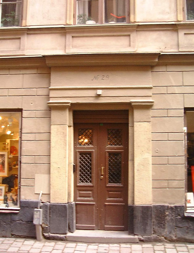 Portal of 29, Österlånggatan in Gamla stan, Stockholm. Perspective fixed digitally.